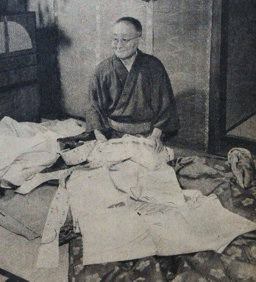 長田幹彦